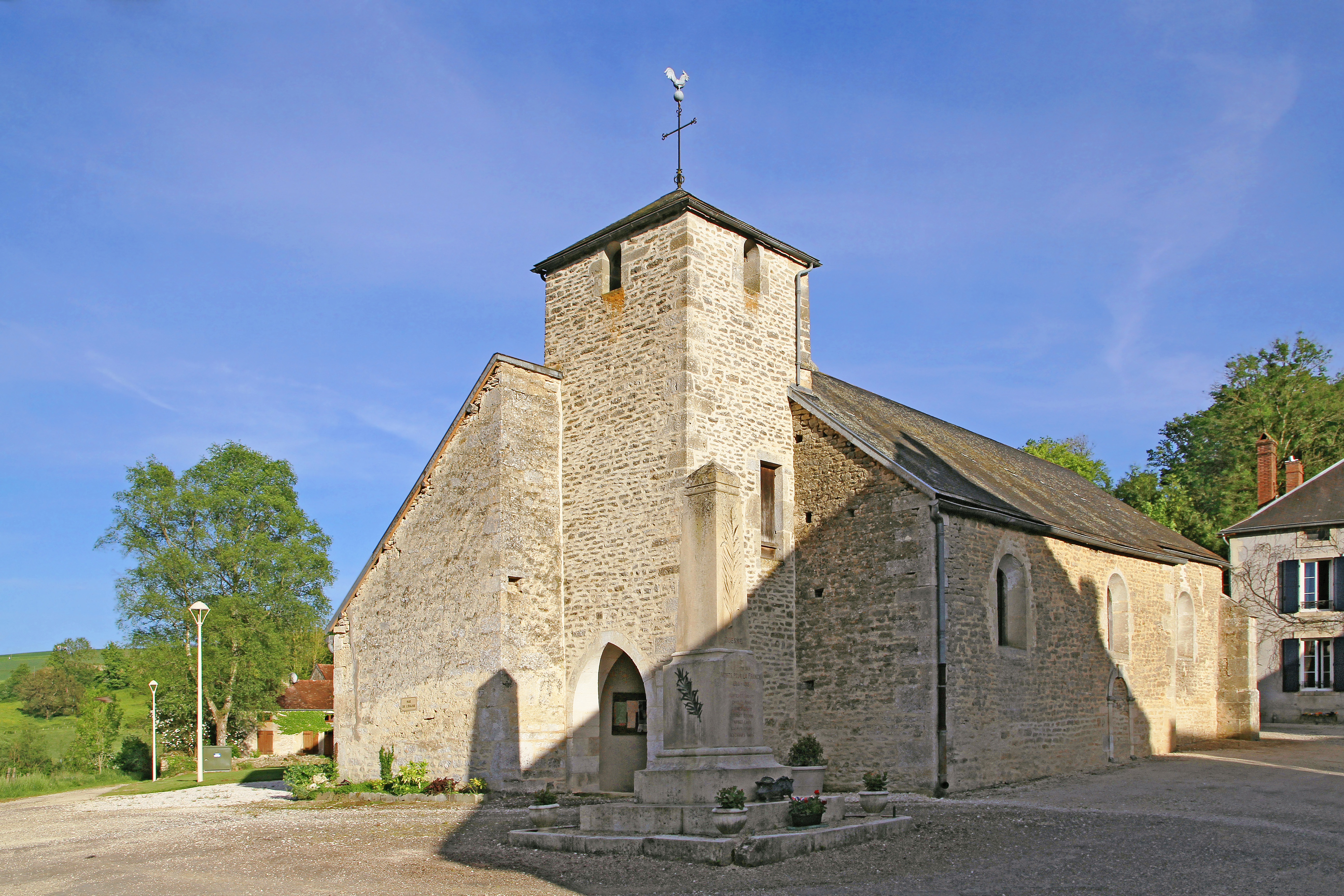 Église Saint-Philippe-et-Saint-Jacques de Duesme